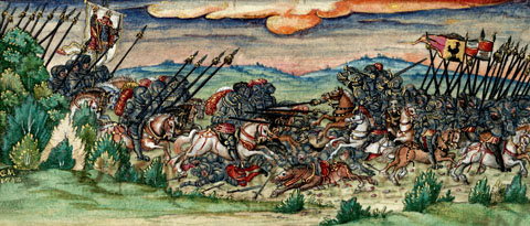 Lorenz Fries, Chronik der Bischöfe von Würzburg, folio 207r (Cyriakus-Schlacht 1266, Domkapitel Würzburg gegen die Henneberg und Castell, Sieg des Domkapitels)